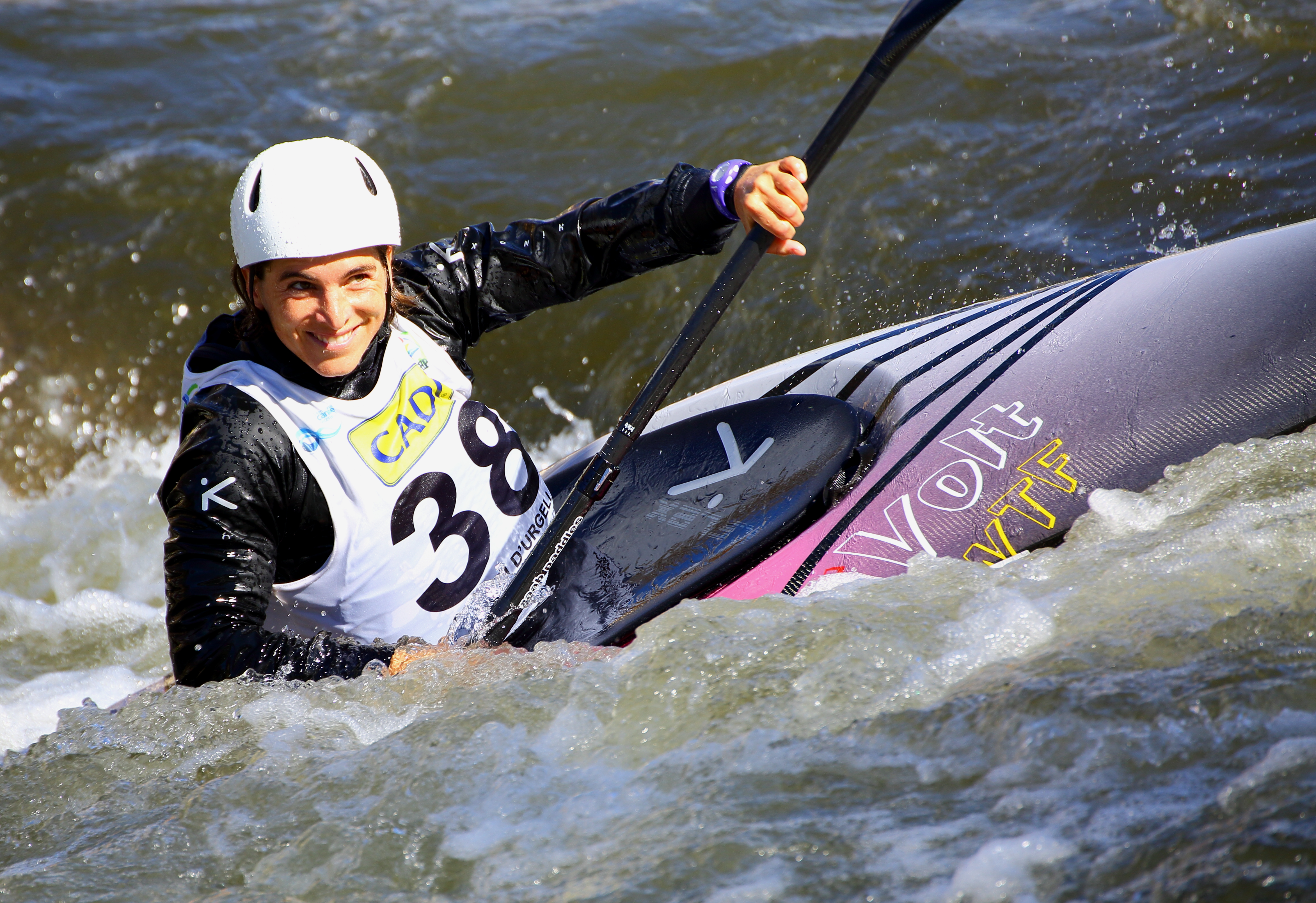 2ª Copa de España de Slalom Olímpico Seo de Urgel Equipo: Club Atlético San Sebastián